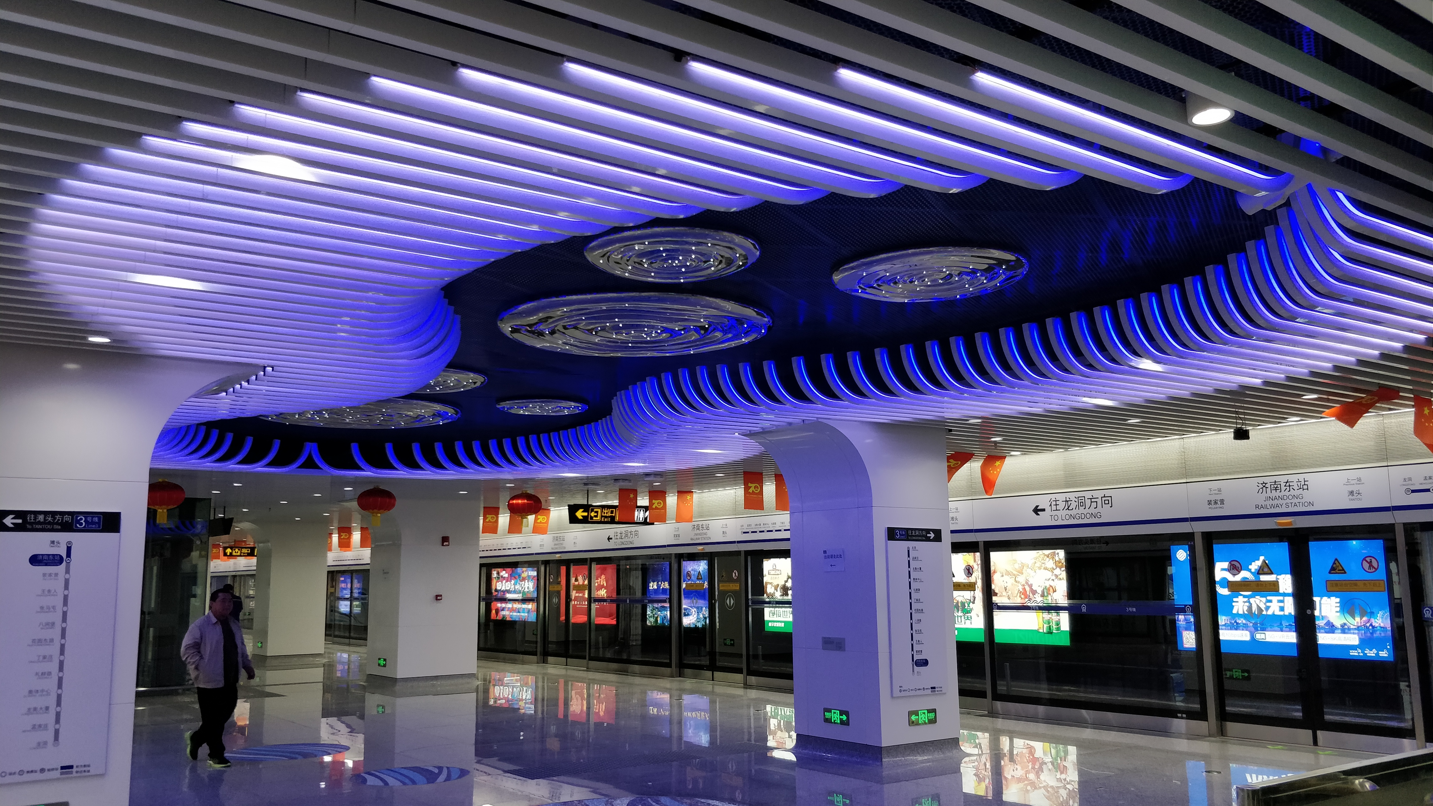 中文（中国大陆）: 济南东站（地铁站）